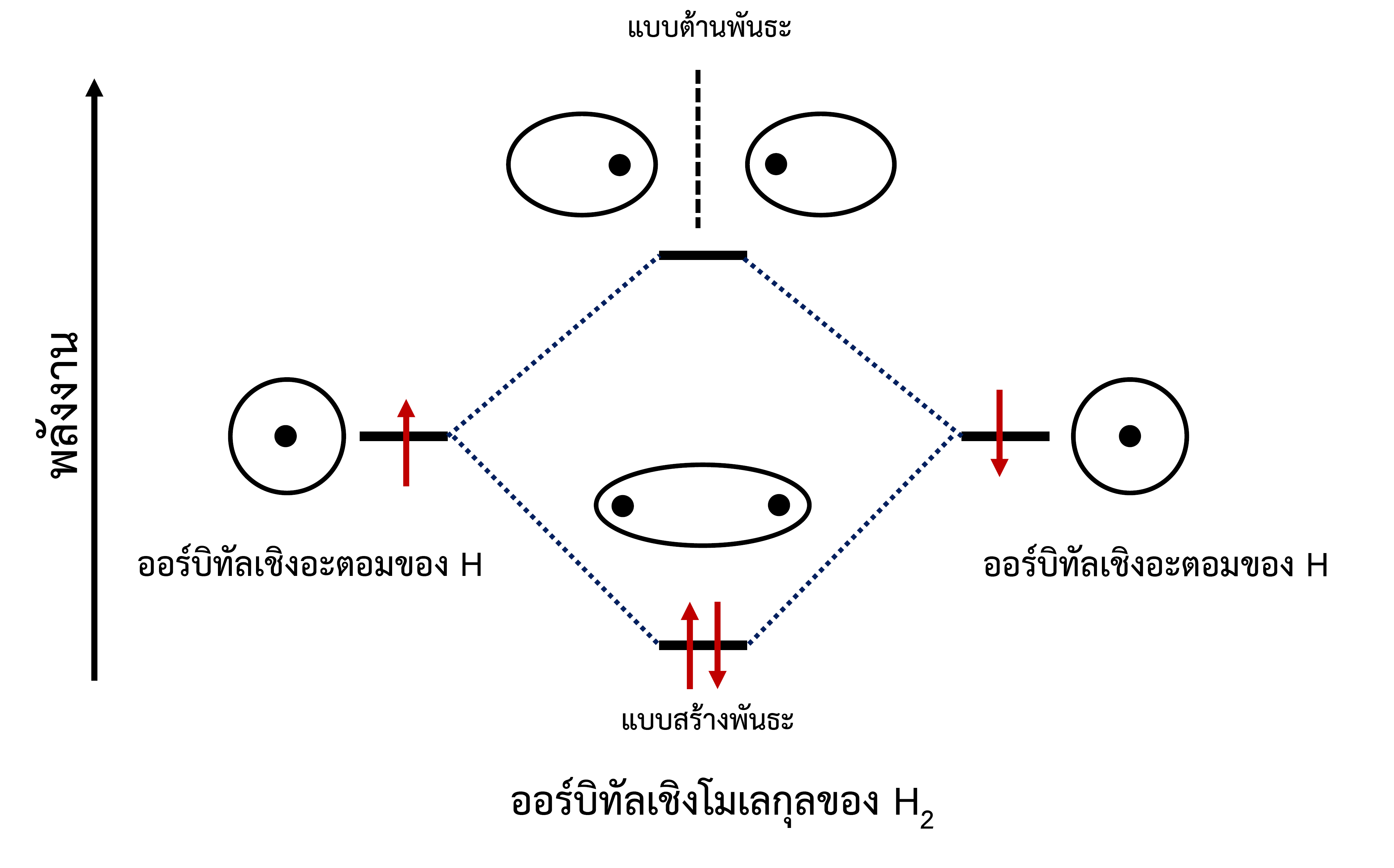 TH H2 MOs